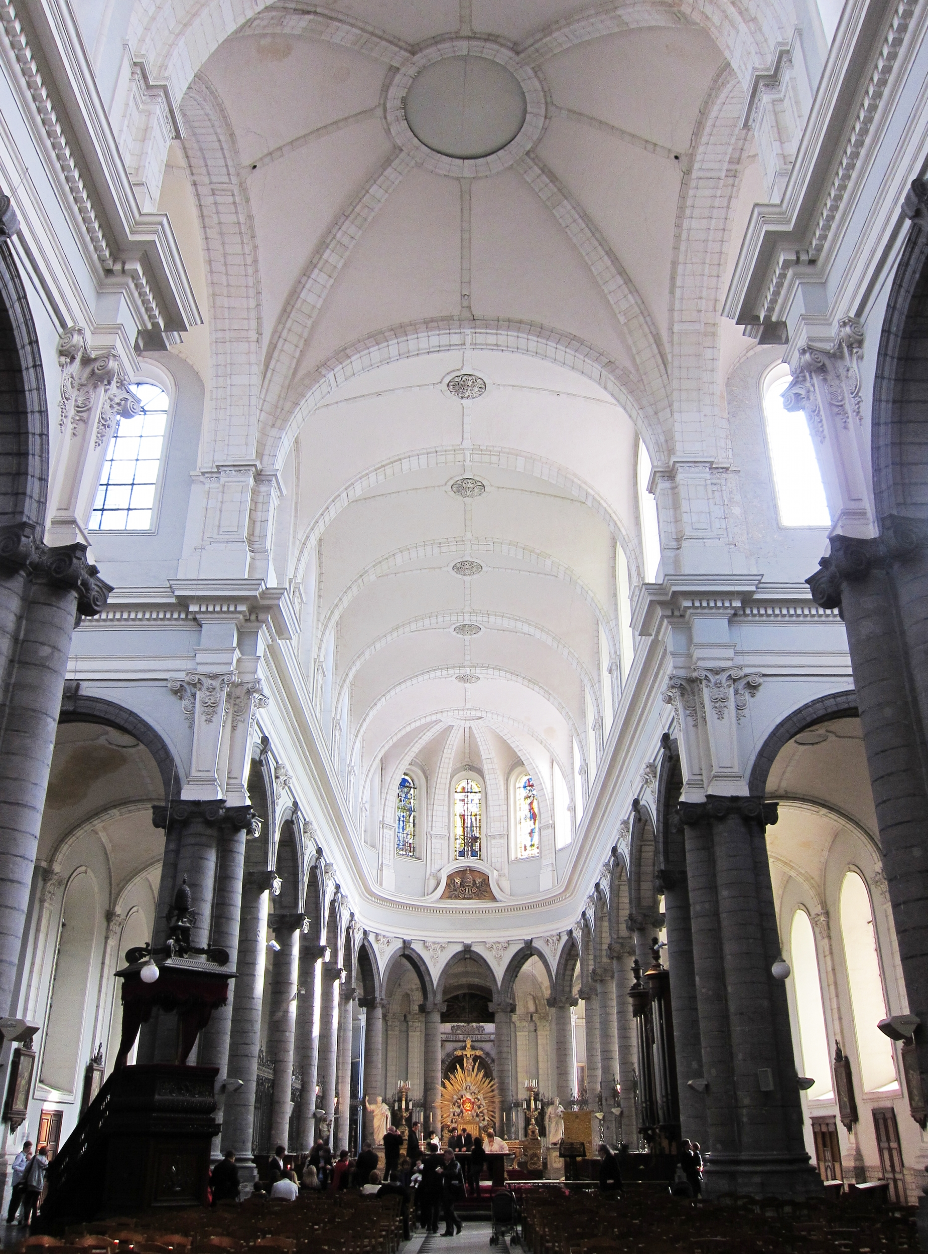 La nef de la collégiale Saint Pierre de Douai (Nord). .